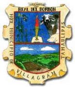 Escudo de Armas de Villagran Tamaulipas